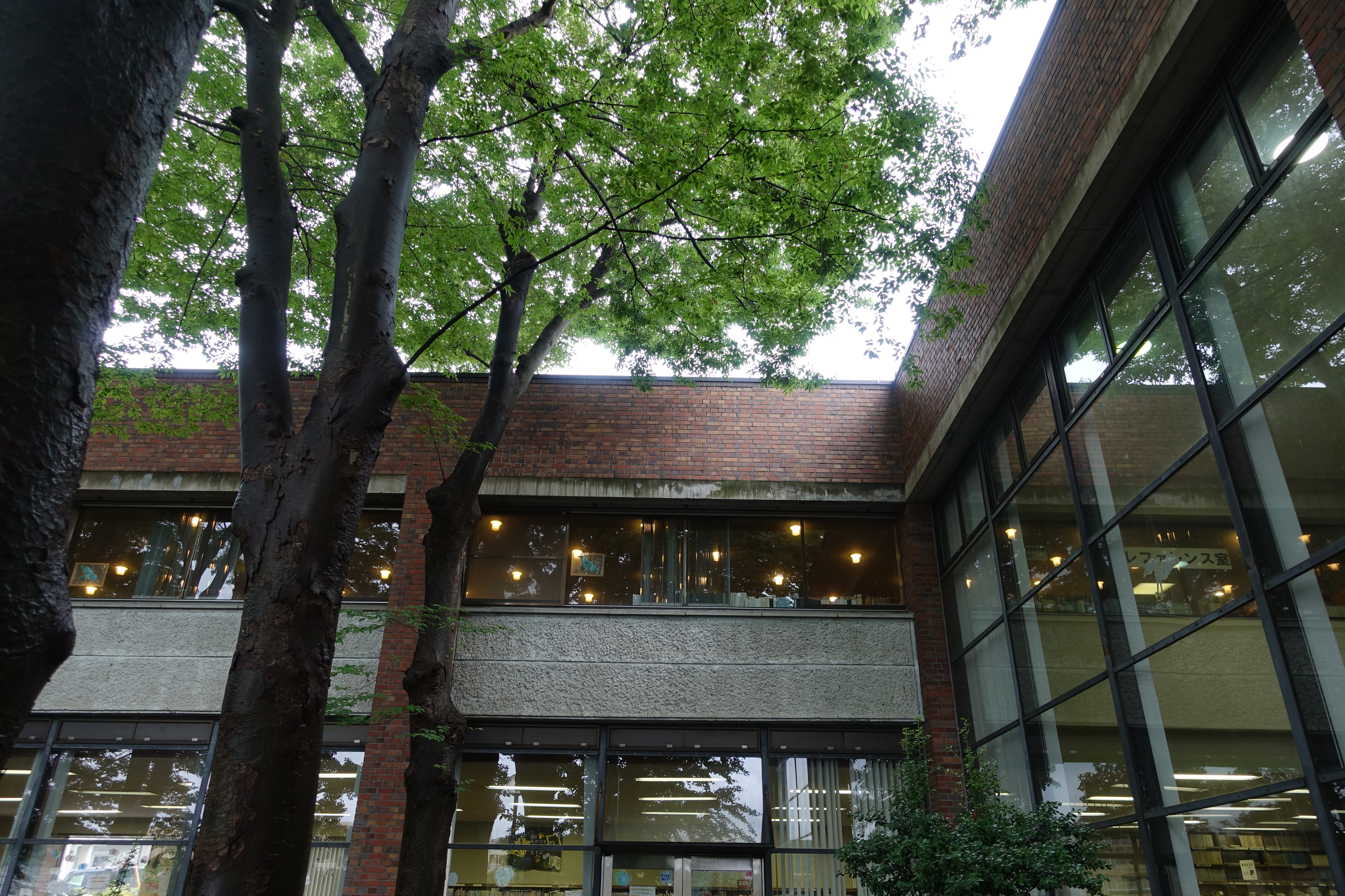 日野市中央図書館の庭側のファサード